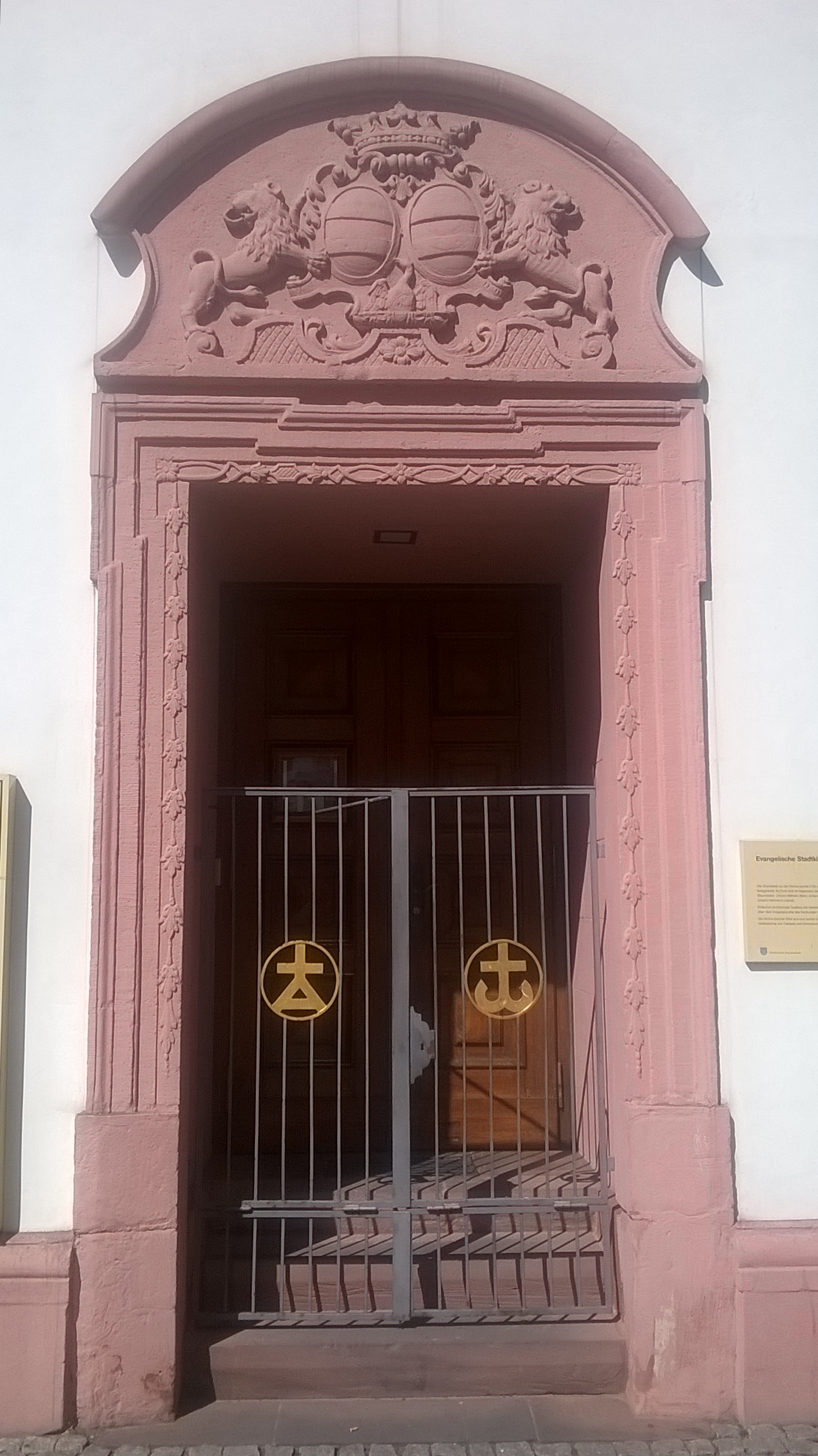 Tür der Stadtkirche